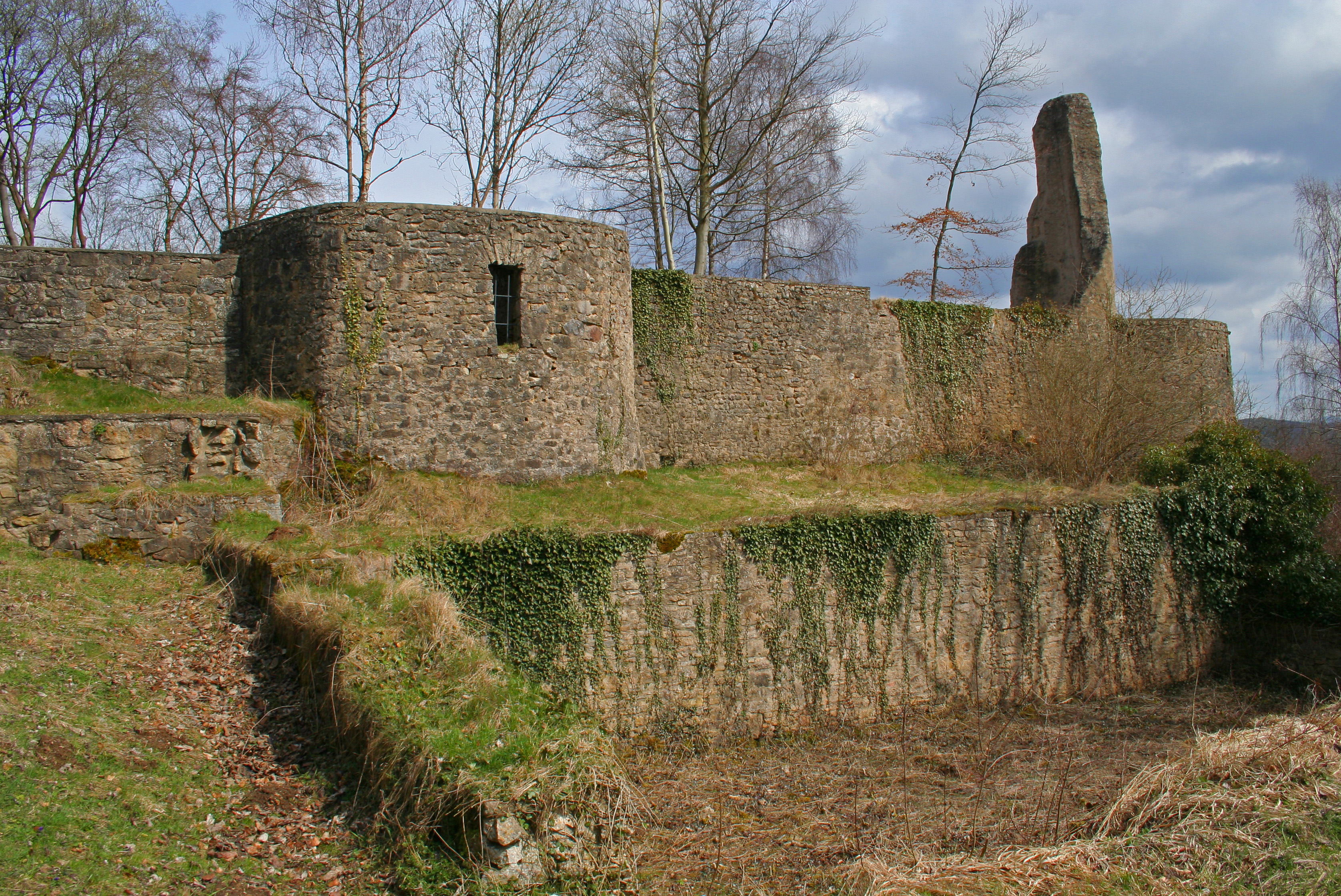 Burgruine Dollendorf-Schloßthal in der Eifel